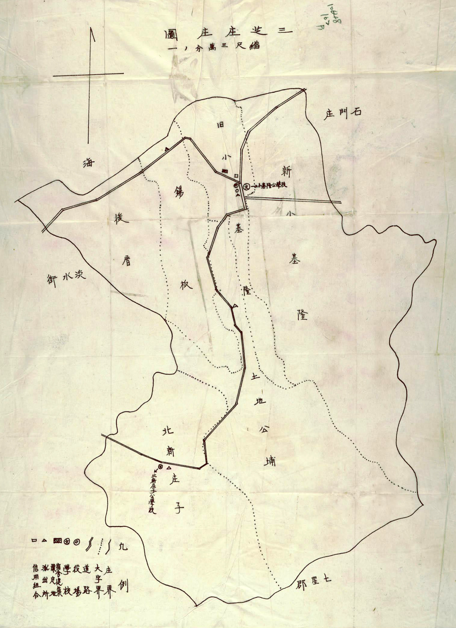 台灣日治時期的三芝庄庄圖，圖中包含北新庄子、土地公埔、後厝、錫板、舊小基隆、新小基隆六個大字的界線。